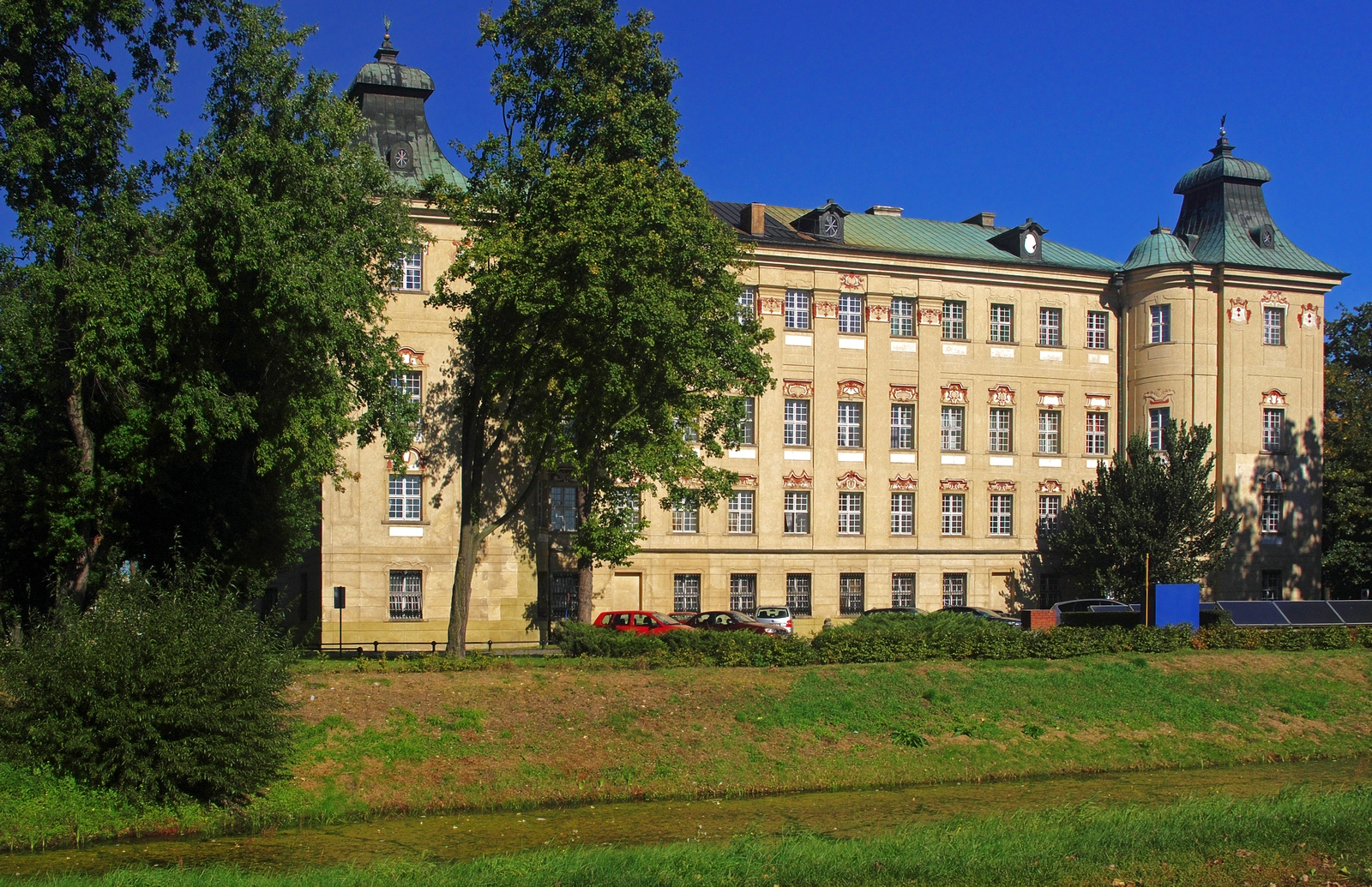 Rydzyna, ul. Zamkowa - zespół zamkowy z XVII-XVIII, XX w.: zamek